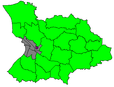 Comunidad París, ubicada en el Barrio Río (Mayagüez Urbano). Mayagüez, Puerto Rico.